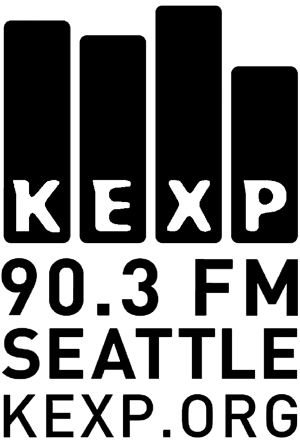 Логотип радиостанции KEXP-FM